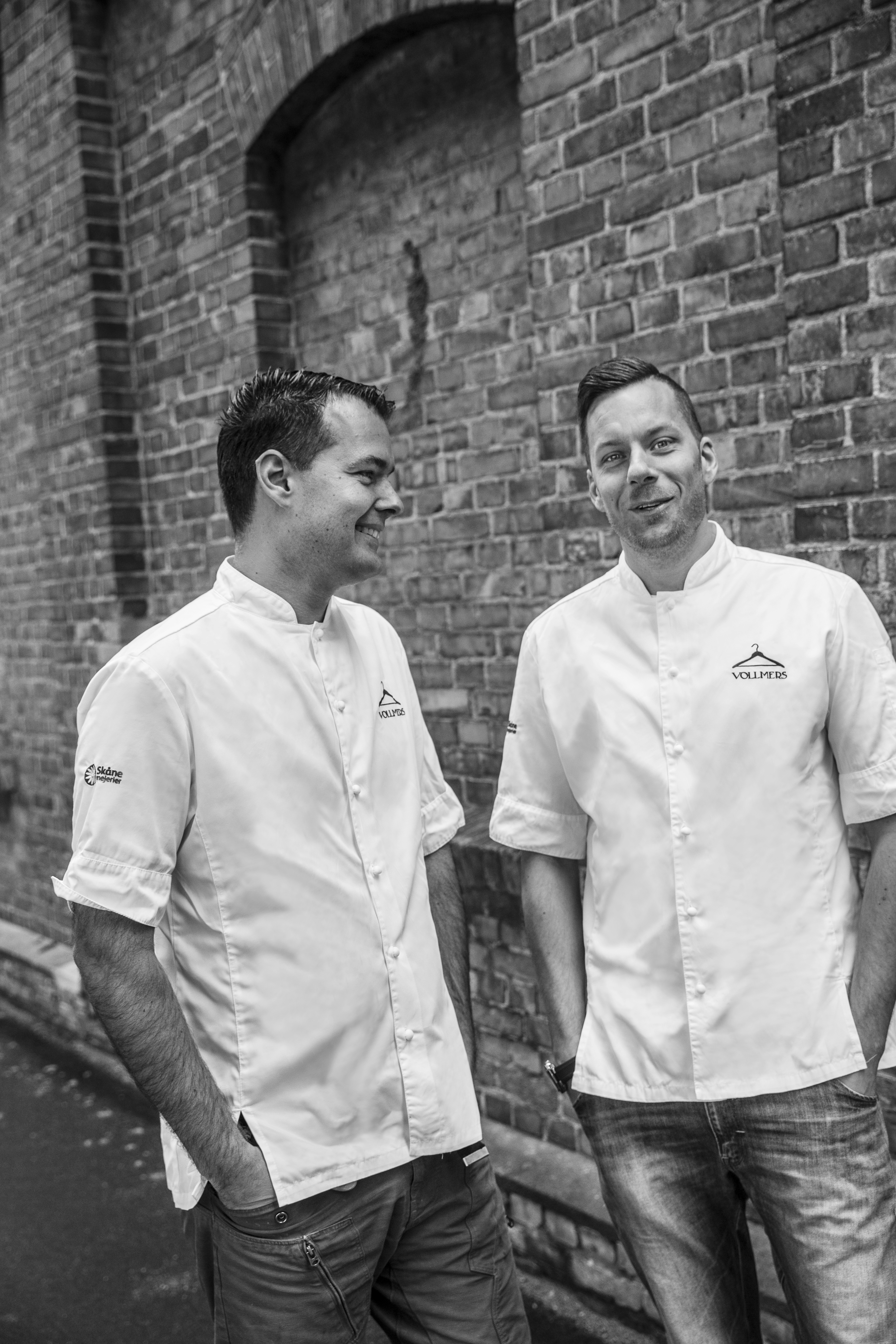 Kockarna Ebbe och Mats Vollmer